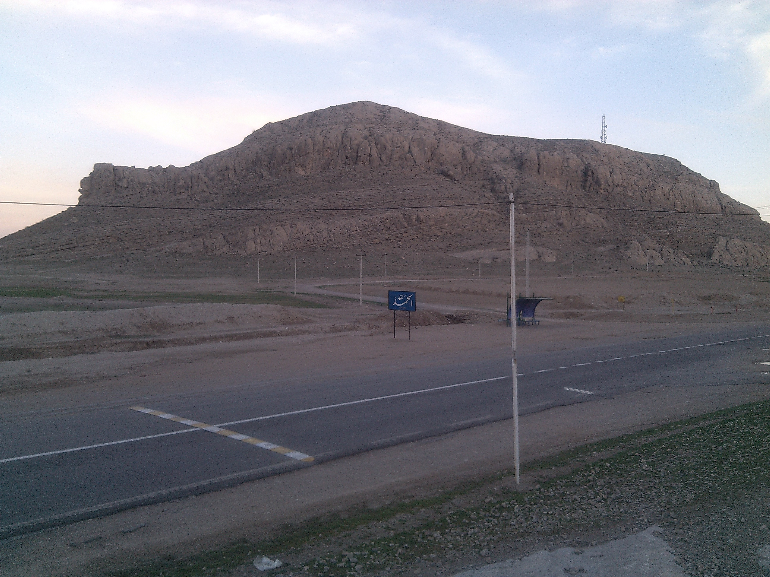 عکس توسط زارعی